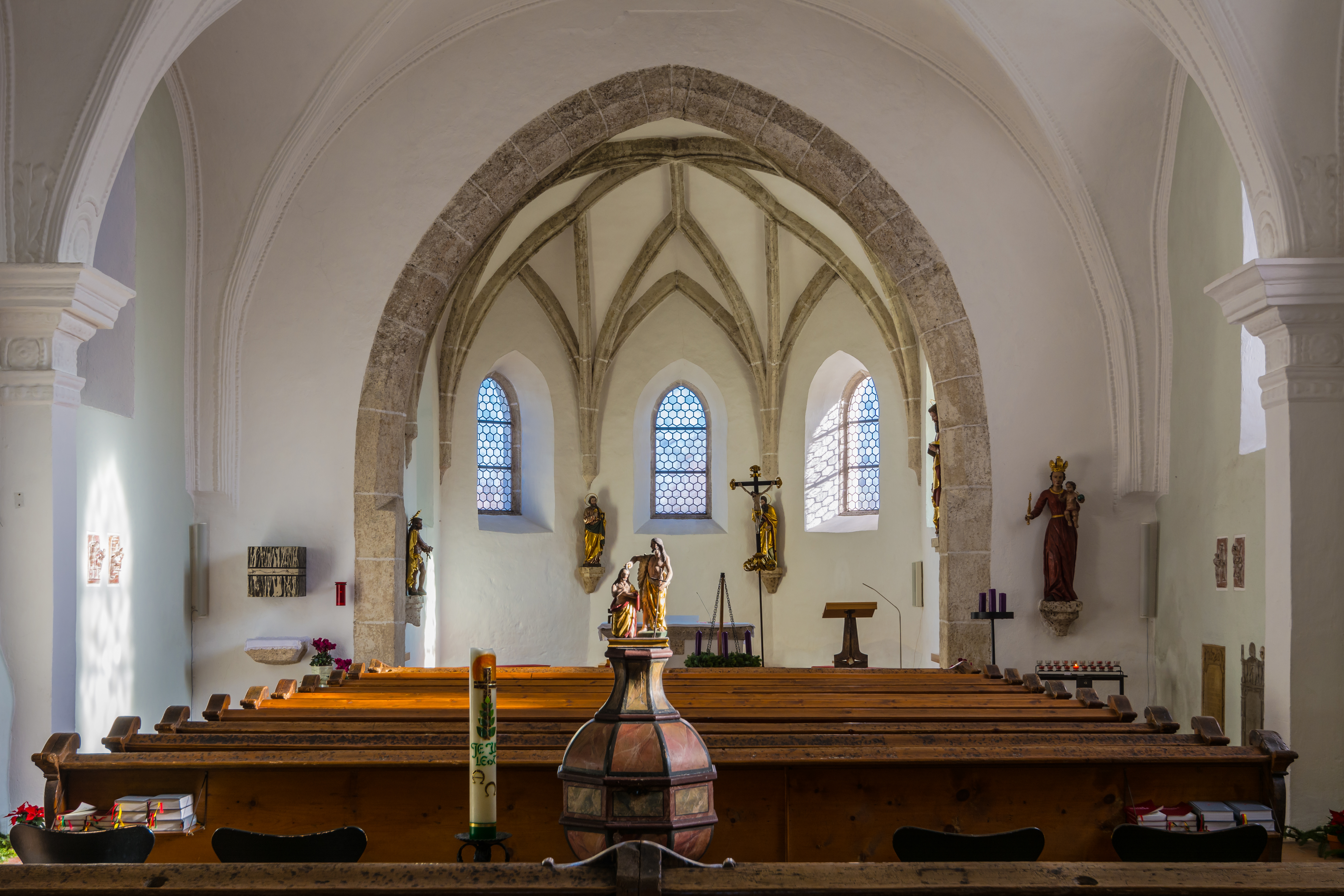 Kath. Pfarrkirche hl. Matthäus